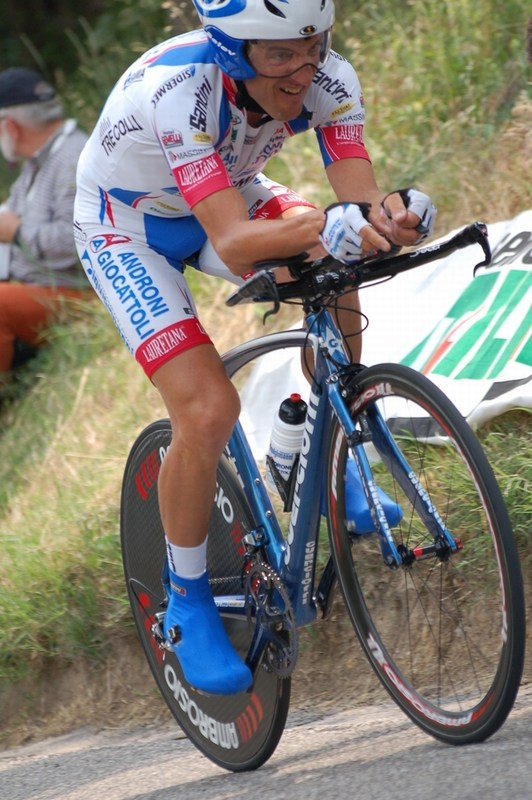 Alessandro Bertolini, Giro d'Italia 2010